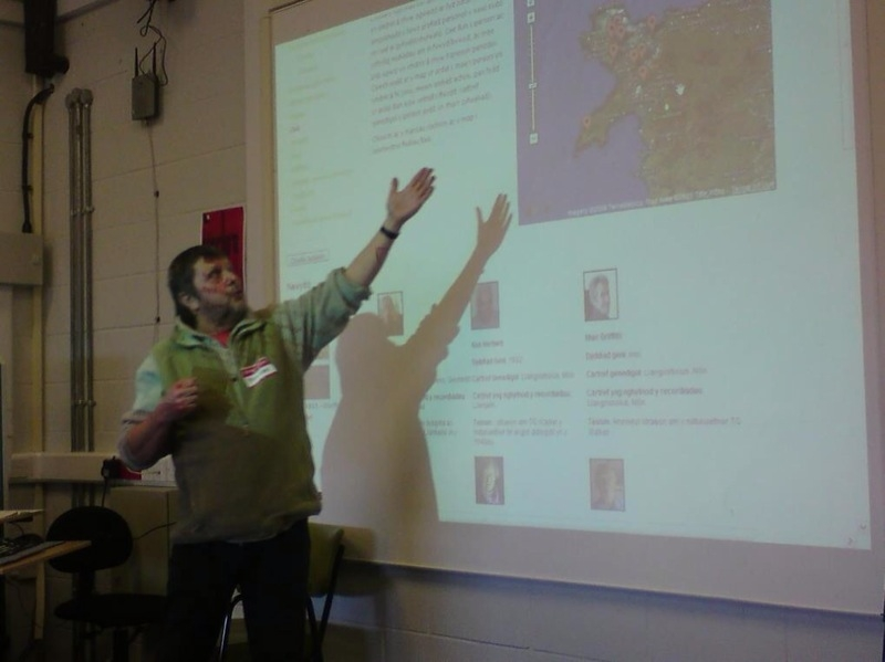 Duncan (o Gymdeithas Edward Llwyd yn dangos rhai o nodweddion eu gwefan yn ystod Hacio'r Iaith 2010. (Llun gan Maldwyn Pate, ond mae'n hapus i'w rannu) Duncan from Cymdeithas Edward Llwyd explaining the features of during Hacio'r Iaith 2010.